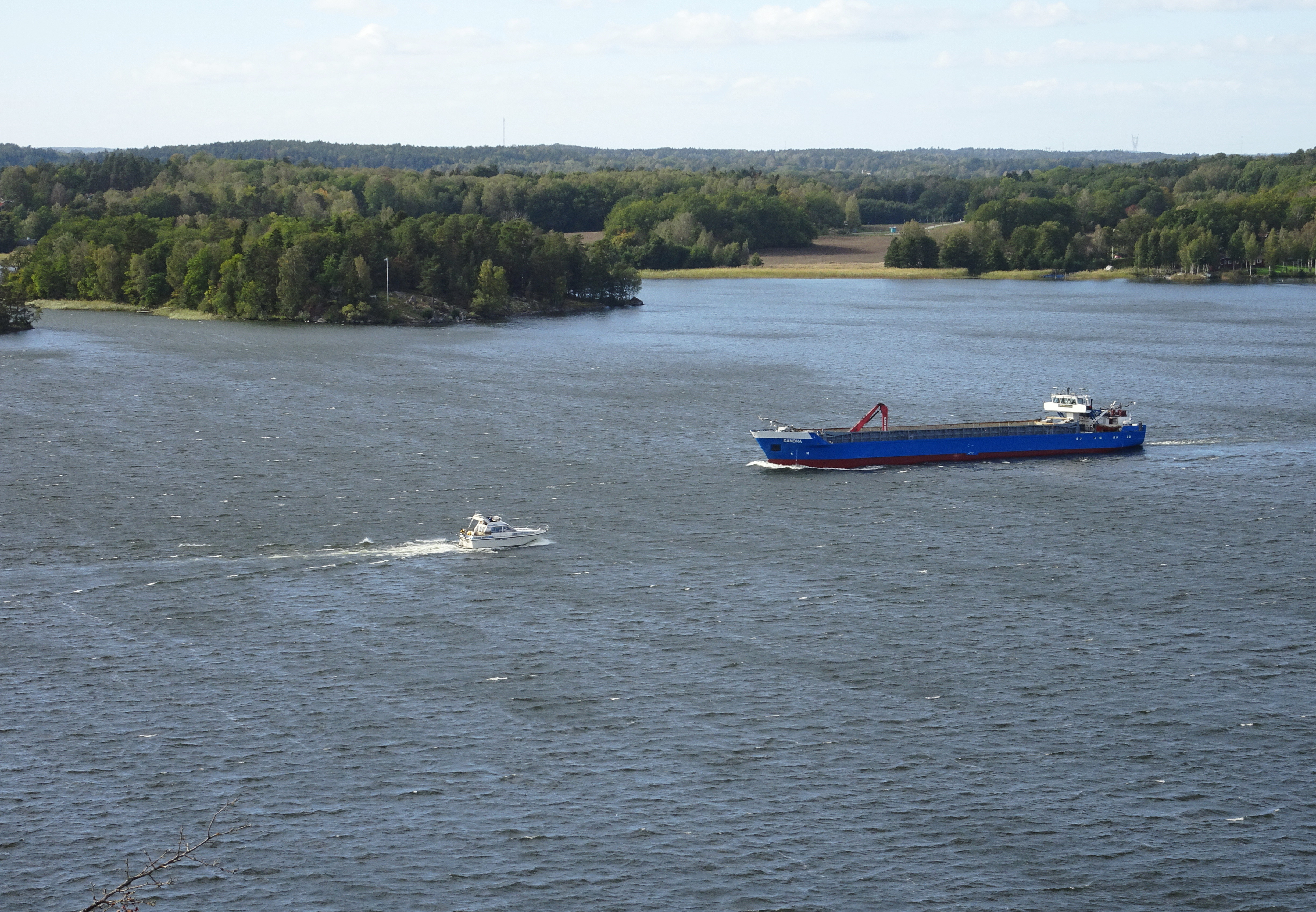 Utsikt från Gåsberget mot väster